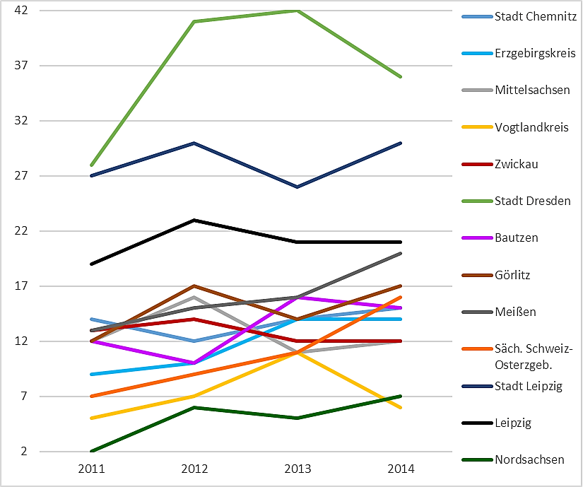 basierend auf Daten aus Kleiner Anfrage, Drs.-Nr.: 6/6428. Verlauf der Anzahl der Steuerfälle mit einem Bruttoeinkommen von über 1 Million Euro je Landkreis / kreisfreier Stadt. Dargestellt ist die Summe aus den nach Grundtarif und Splittingtarif veranlagten Fällen.